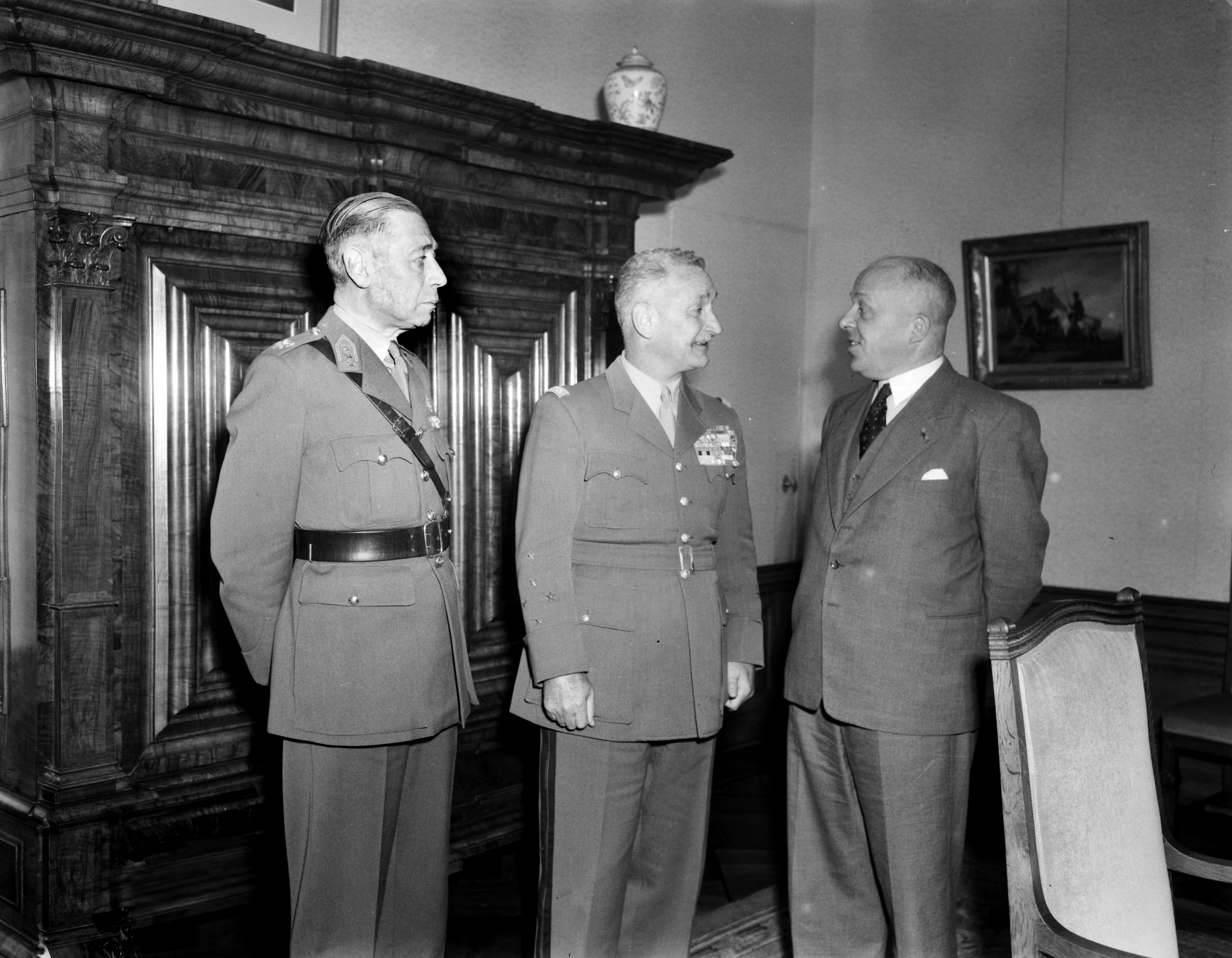 Collectie / Archief : Fotocollectie Anefo Reportage / Serie : [ onbekend ] Beschrijving : Minister van Oorlog C. Staf met de Franse generaal M. Carpentier, bevelhebber van de geallieerde landstrijdkrachten in Centraal-Europa (midden) en de Nederlandse Chef-Staf luitenant-generaal B.R.P.F. Hasselman Datum : 8 oktober 1953 Locatie : Den Haag Trefwoorden : ministers, officieren Persoonsnaam : Carpentier, M., Hasselman, B.R.P.F., Staf, C. Instellingsnaam : Ridderzaal Fotograaf : Duinen, […] van / Anefo Auteursrechthebbende : Nationaal Archief Materiaalsoort : Negatief (zwart/wit) Nummer archiefinventaris : bekijk toegang 2.24.01.04 Bestanddeelnummer : 906-0224